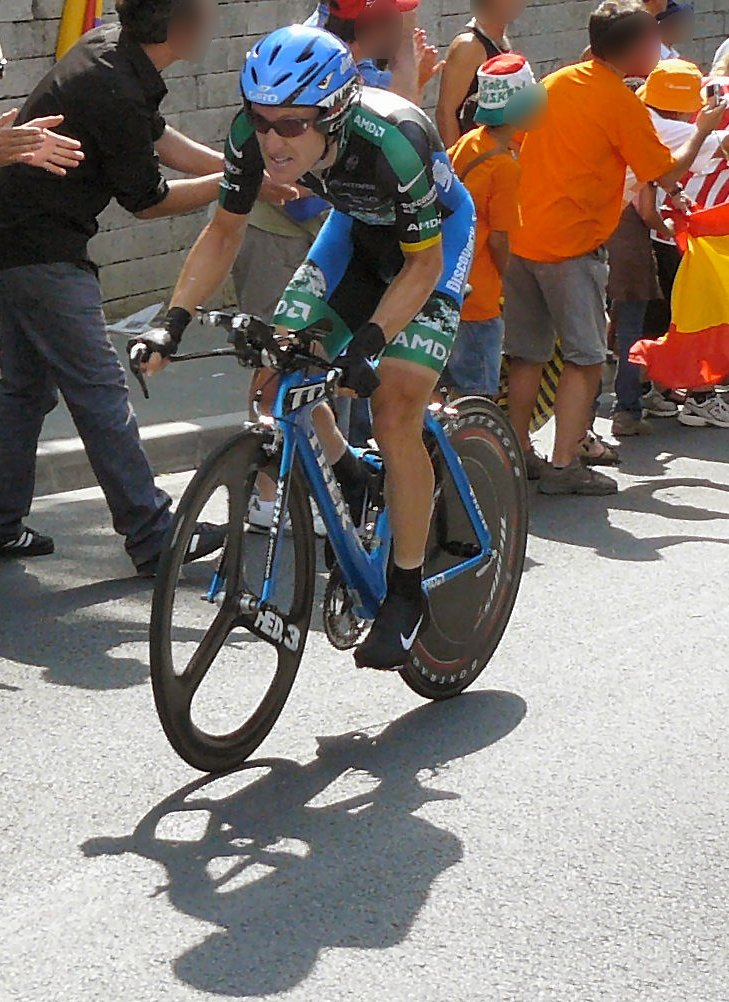 Levi Leipheimer, 19ème étape du Tour de France 2007